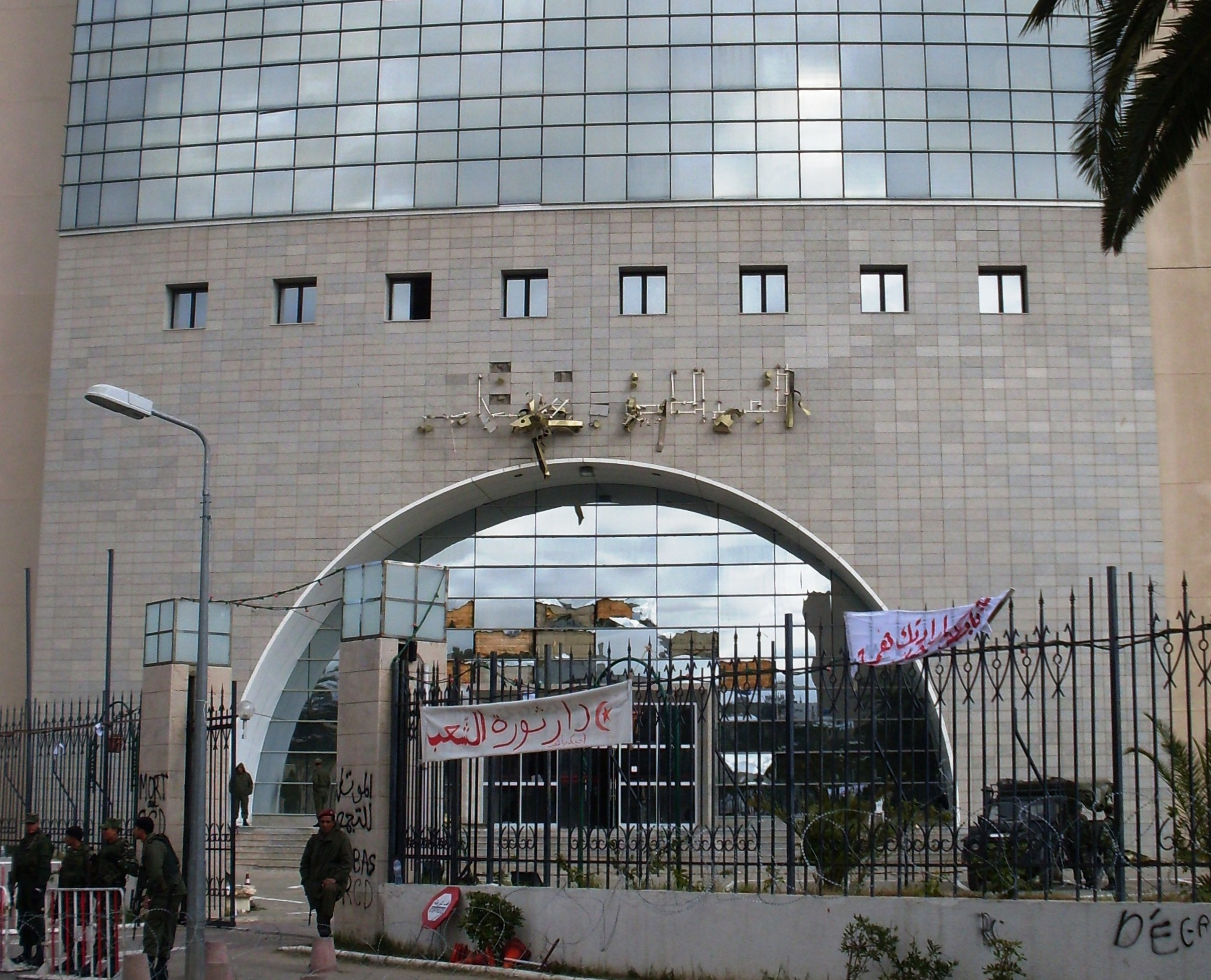 Siège du RCD lors de la révolution des Jasmins